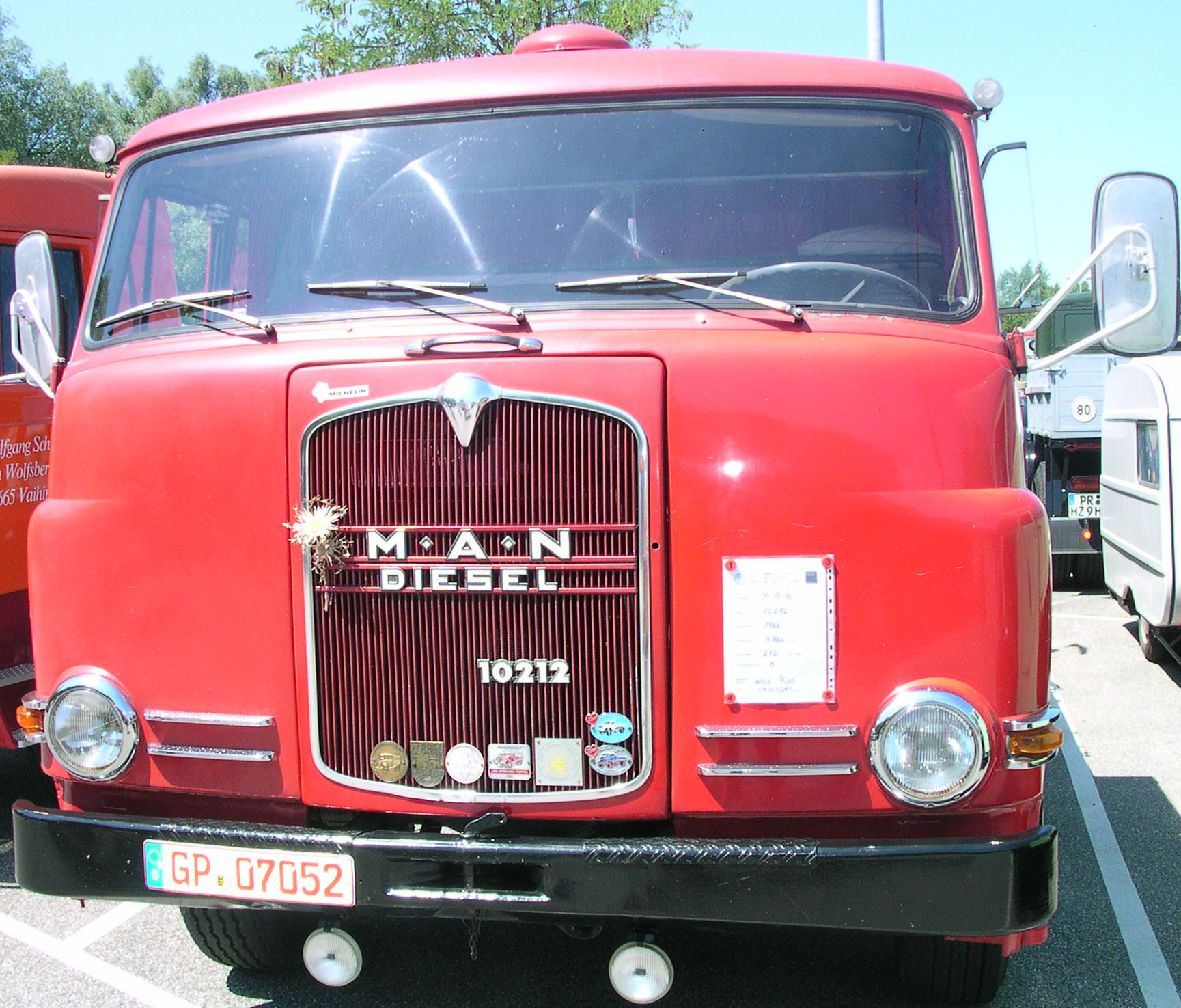 Nutzfahrzeug-IAA 2004 in Hannover. MAN 10212, Baujahr 1966, 157 KW, 212 PS